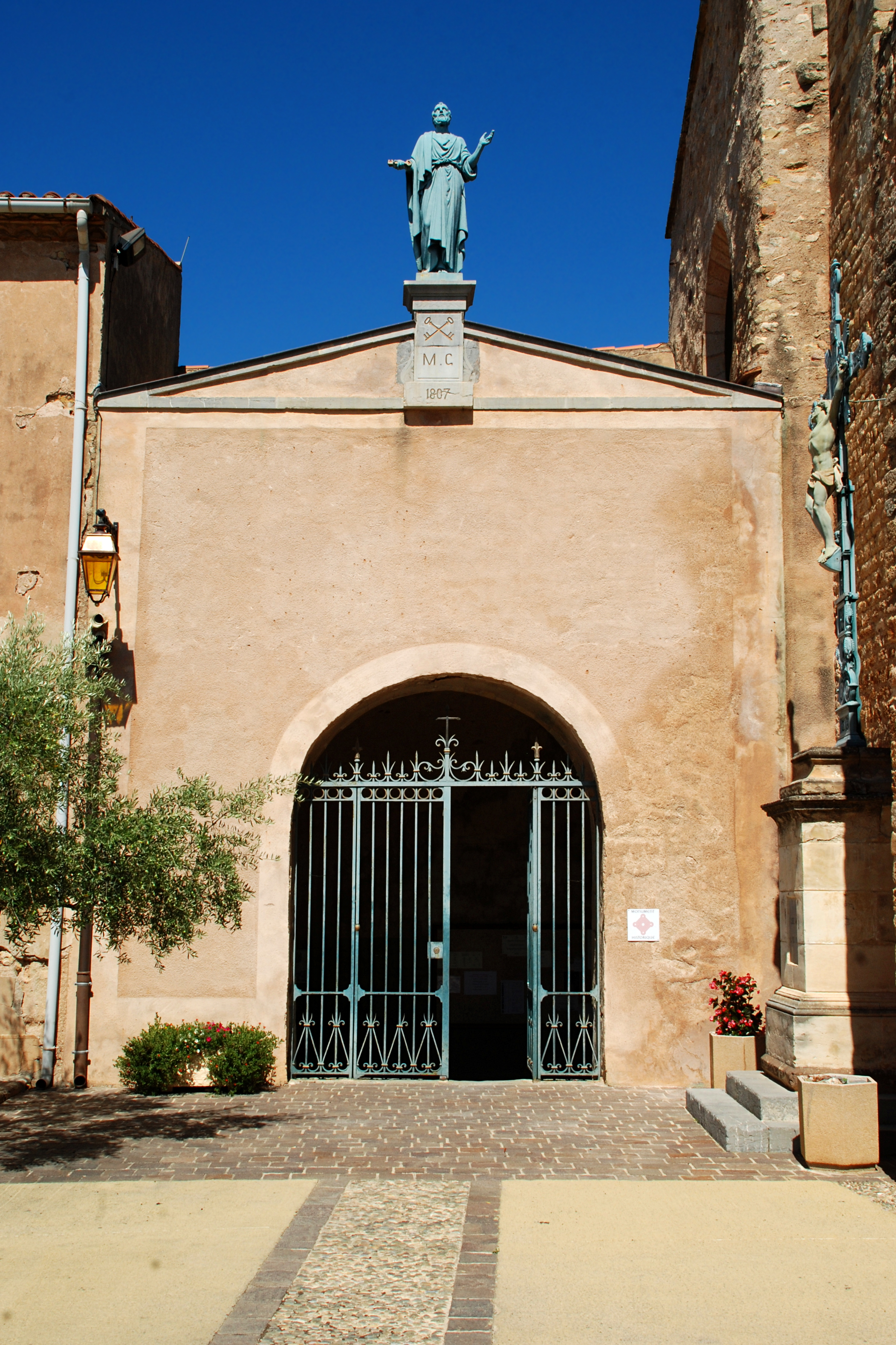 France - Languedoc - Hérault - Église Sainte-Marie de Quarante .